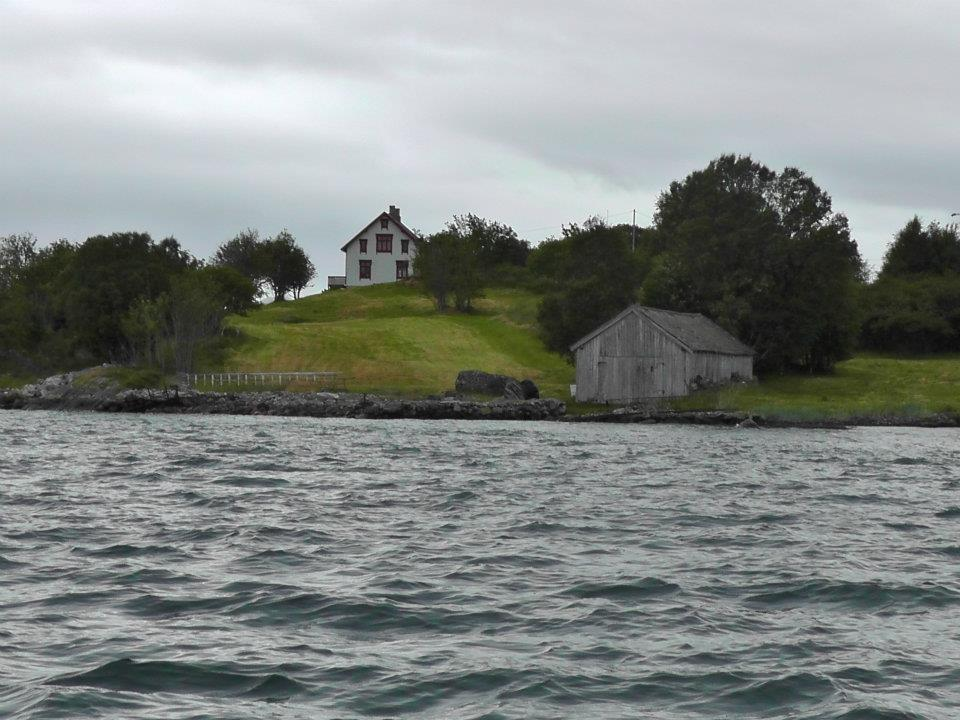 Torholmen